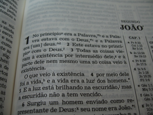 João 1:1 na Tradução do Novo Mundo das Escrituras Sagradas